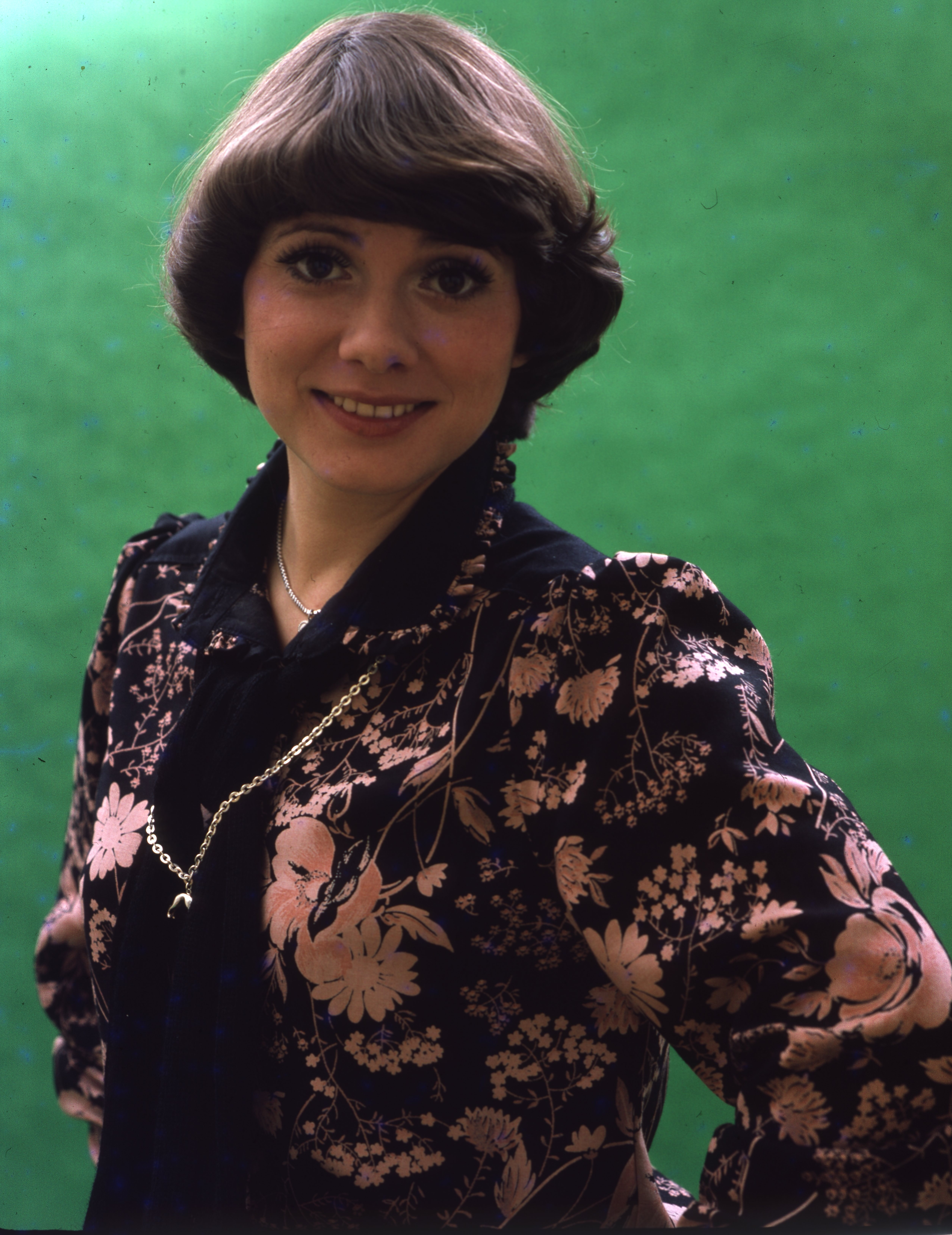 Katona Klári énekesnő 1978-ban